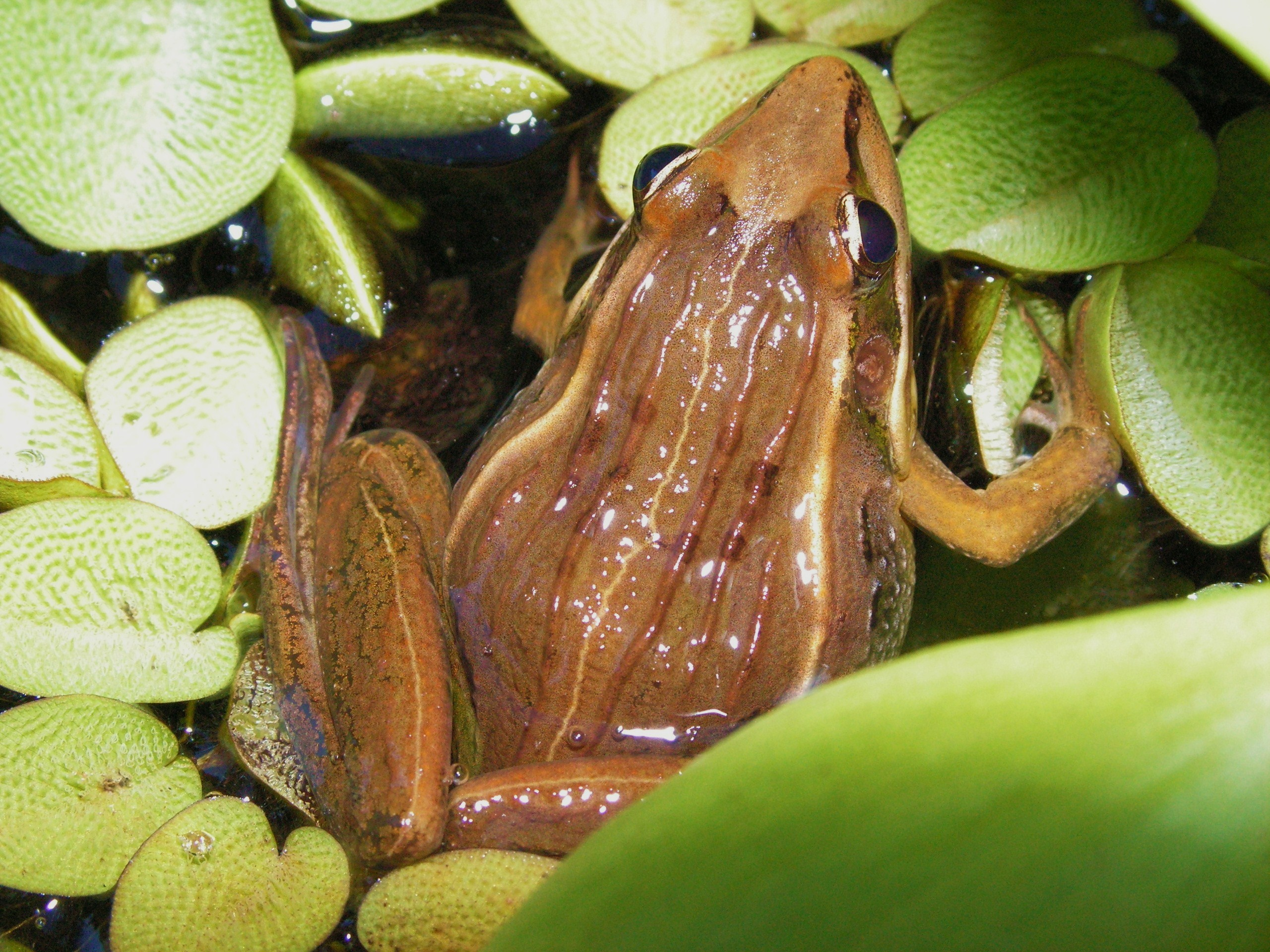 Grenouille Grenouille Ptychadena mascareniensis travail personnel 20/02/2008 Mmanglou Caroline